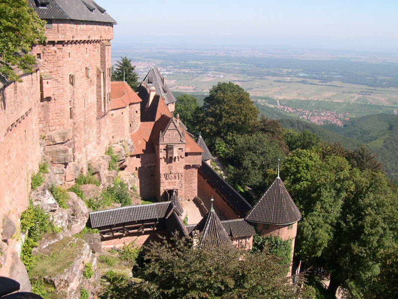 Château du Haut-Koenigsbourg, vue de l'une des tours - France, septembre 2004